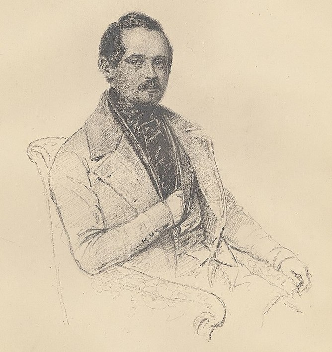 Baron Viktor von Düben på Kägleholm